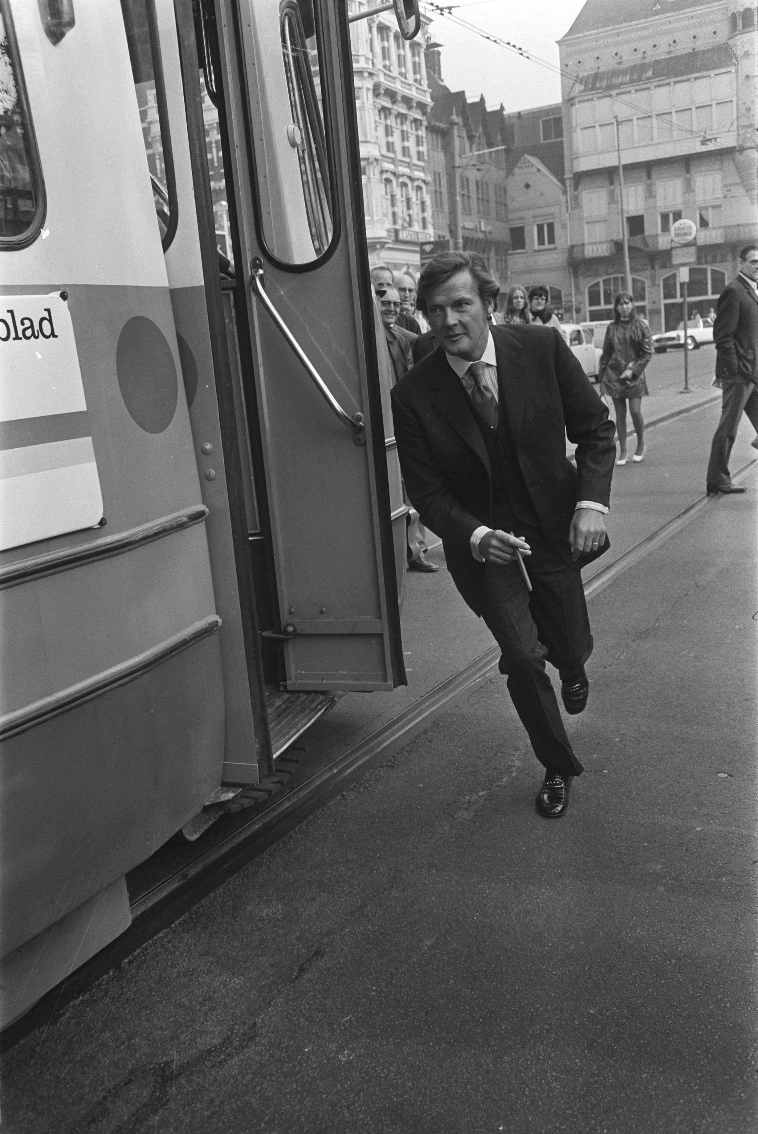 Collectie / Archief : Fotocollectie Anefo Reportage / Serie : [ onbekend ] Beschrijving : The Saint ( Roger Moore ), Engelse filmster, in Amsterda Roger Moore rent naar tram Datum : 10 oktober 1970 Locatie : Amsterdam, Noord-Holland Trefwoorden : FILMSTERREN Persoonsnaam : Moore, Roger Fotograaf : Koch, Eric / Anefo Auteursrechthebbende : Nationaal Archief Materiaalsoort : Negatief (zwart/wit) Nummer archiefinventaris : bekijk toegang 2.24.01.05 Bestanddeelnummer : 923-9135